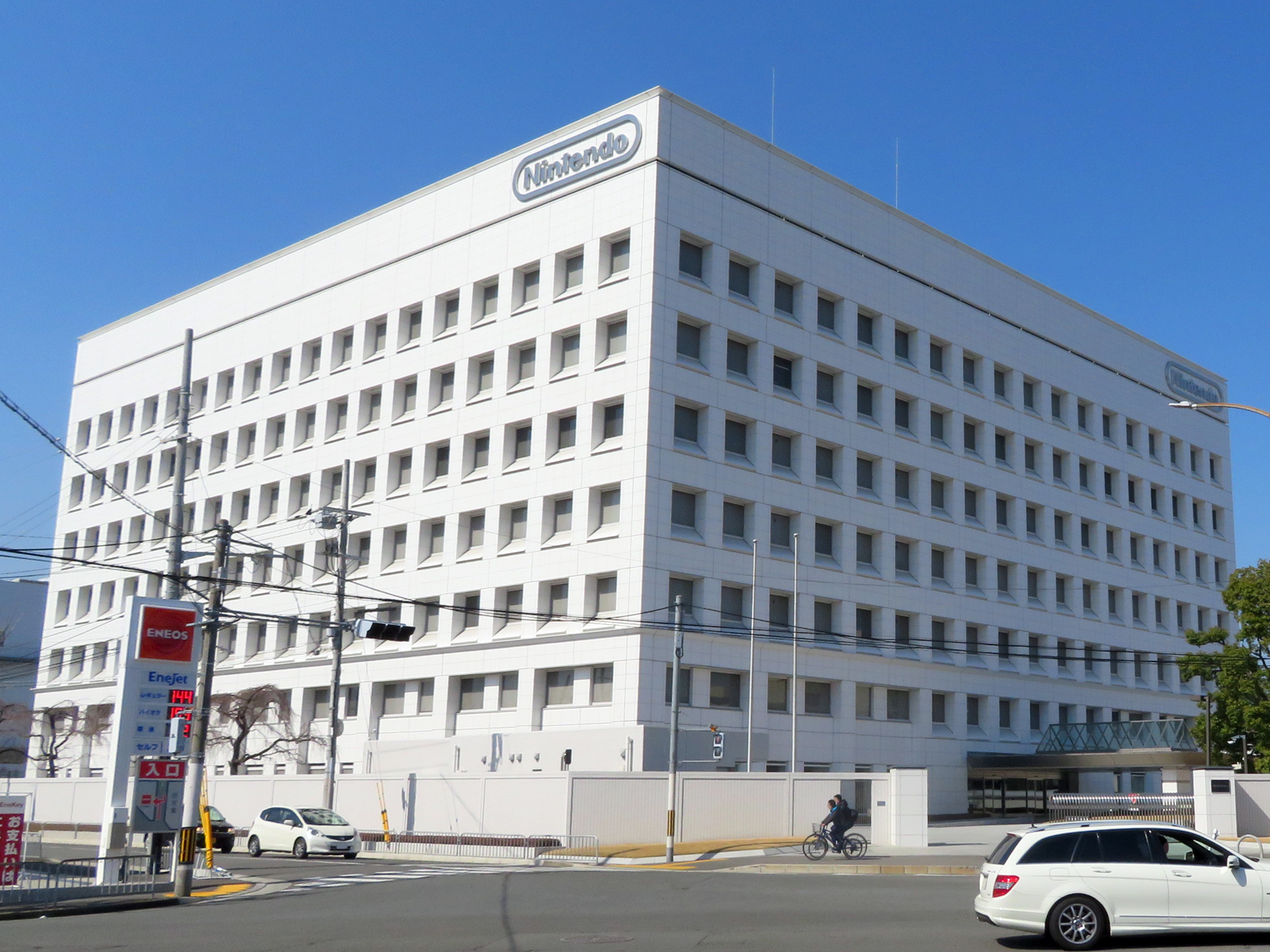 任天堂株式会社本社を撮影。